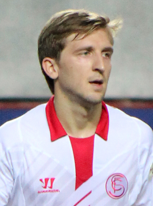 Futbolista del Sevilla FC cedido por el Chelsea FC